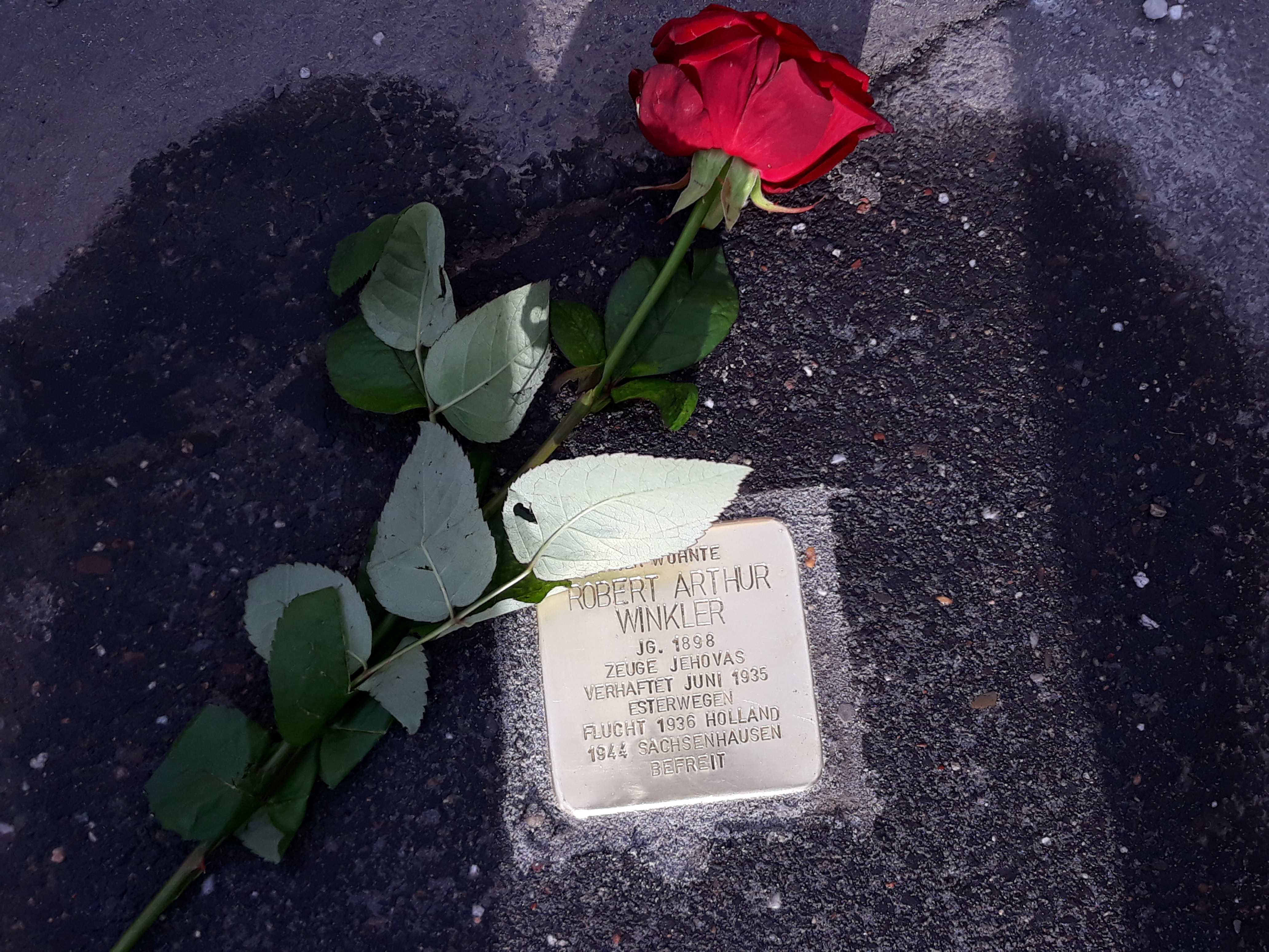 Endenischer Straße 58 Stolperstein Robert Arthur Winkler